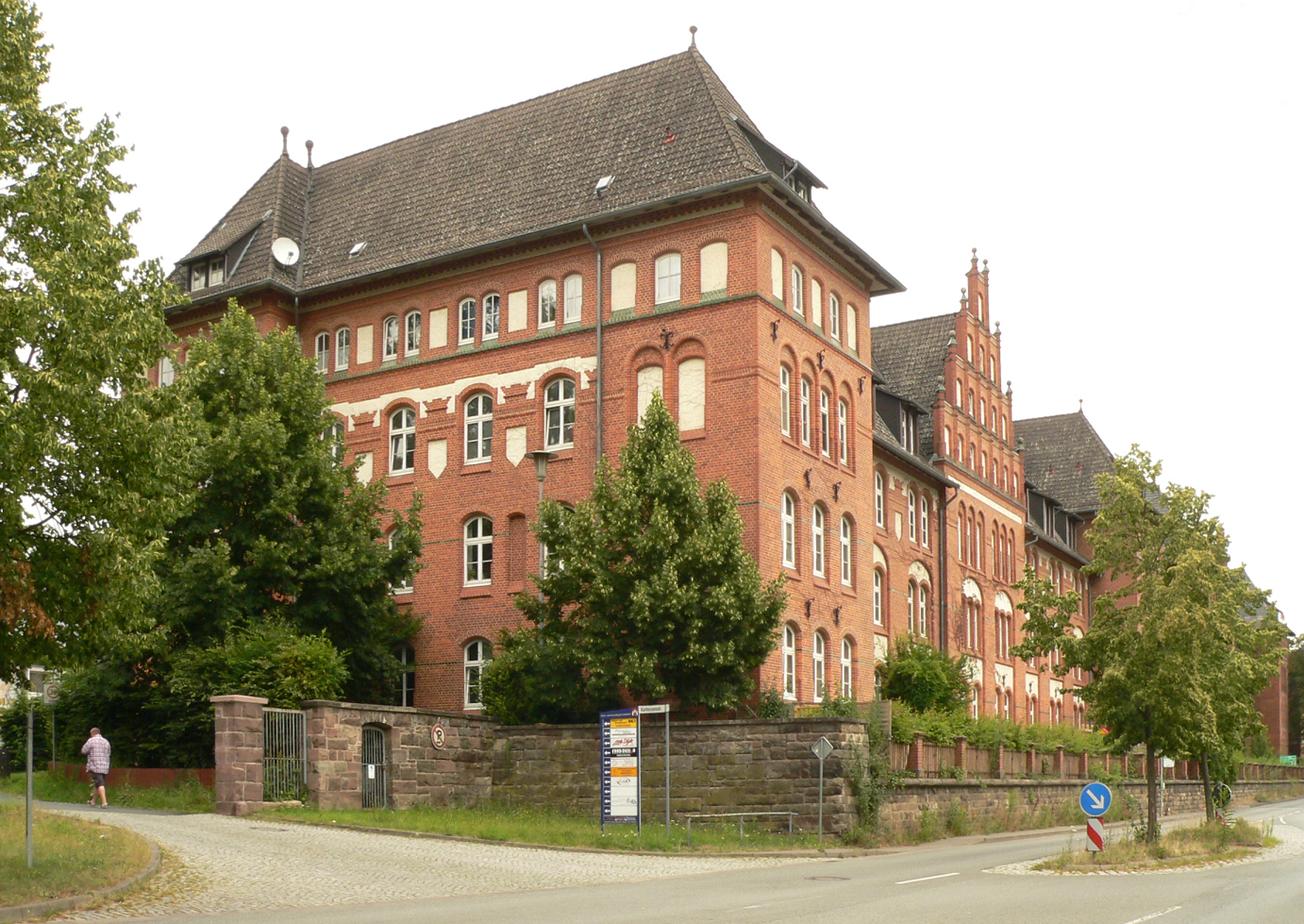 Kurhessenkaserne in Hann Münden, Straße auf dem Gelände